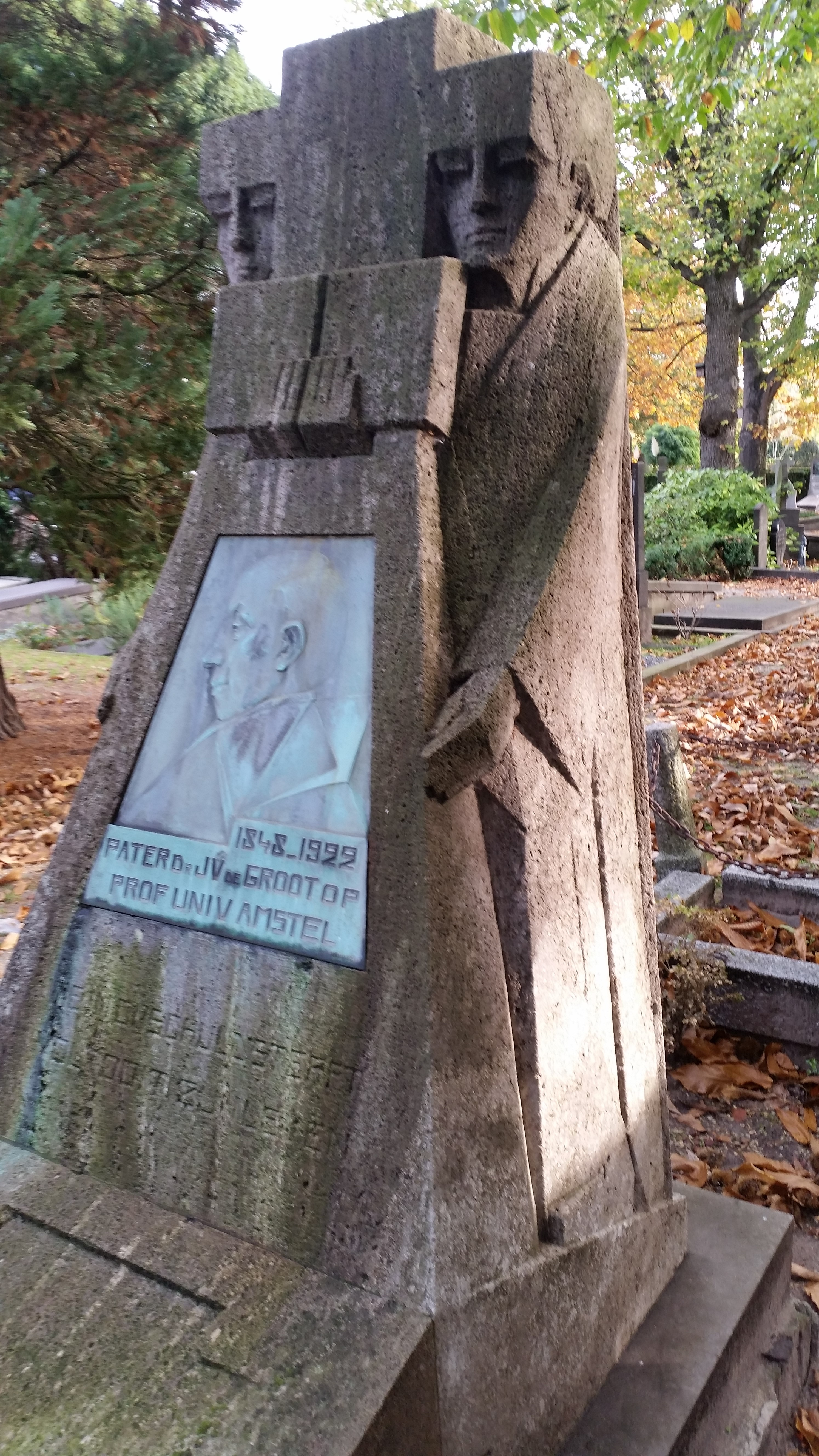 Grafmonument J.V. de Groot, zijaanzicht